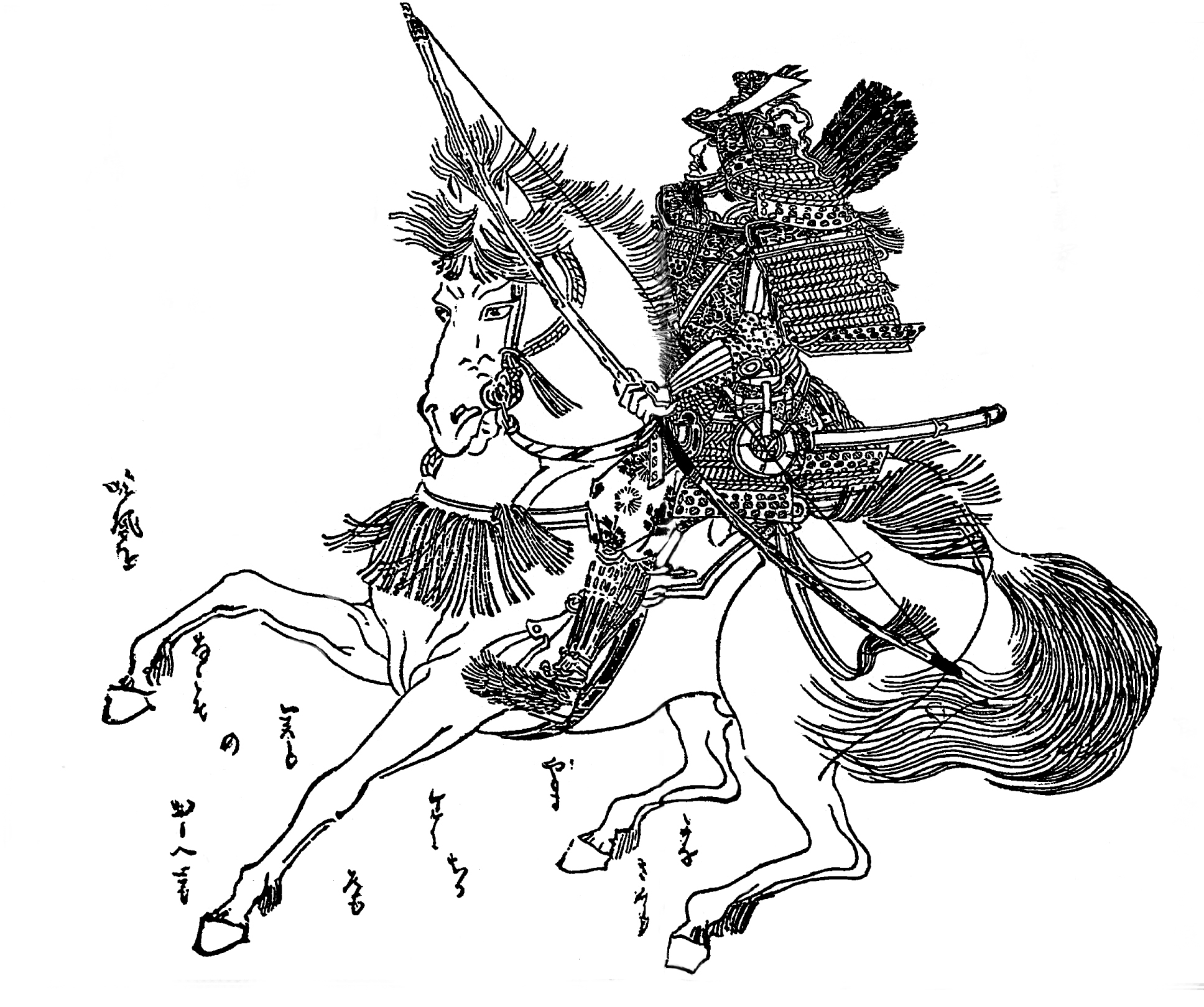 源義家。平安時代後期の武将。／江戸時代『前賢故実』より。画：菊池容斎